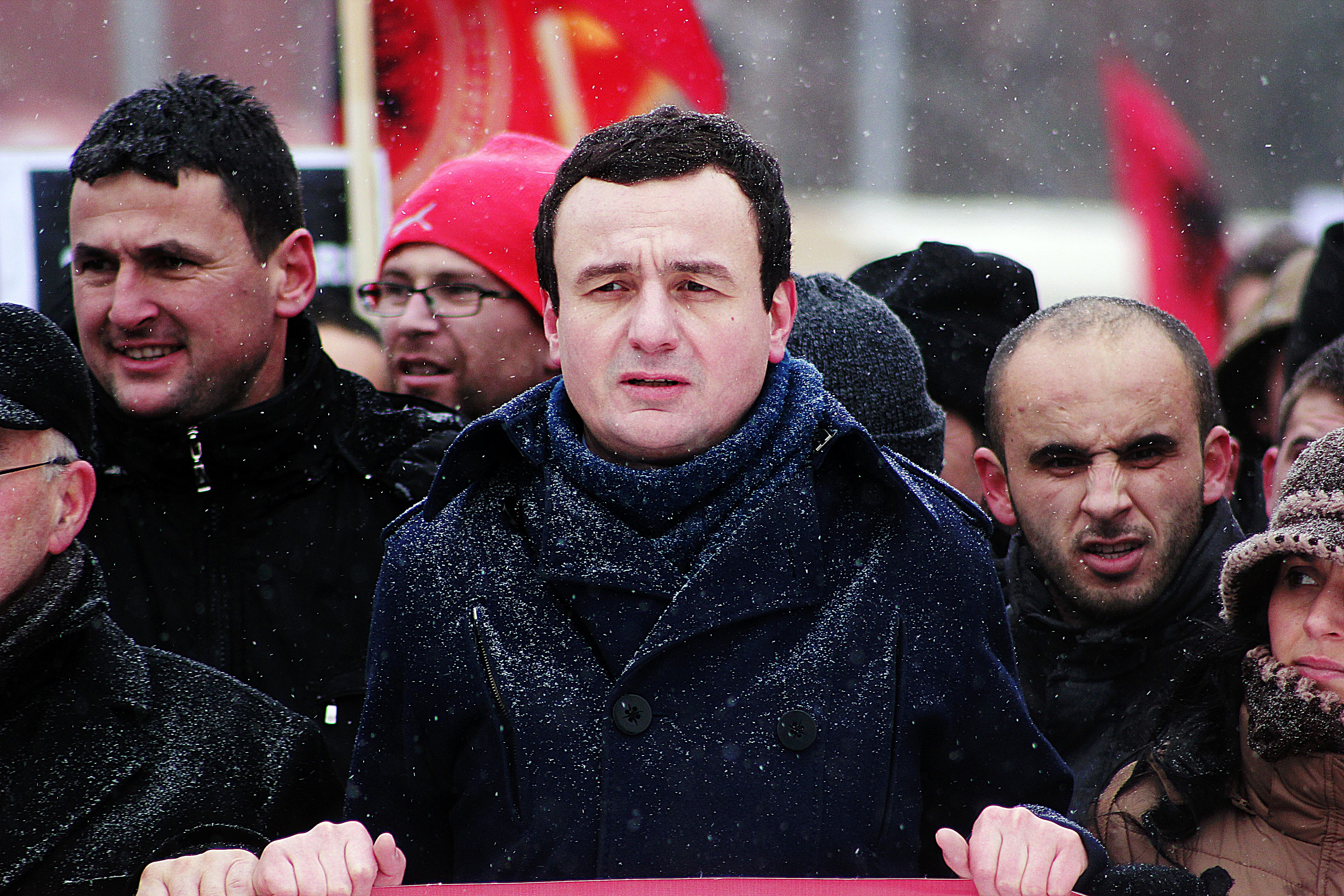 Lideri i Lëvizjes Vetëvendosje Albin Kurti duke protestuar gjatë një dite të ftohtë dimri